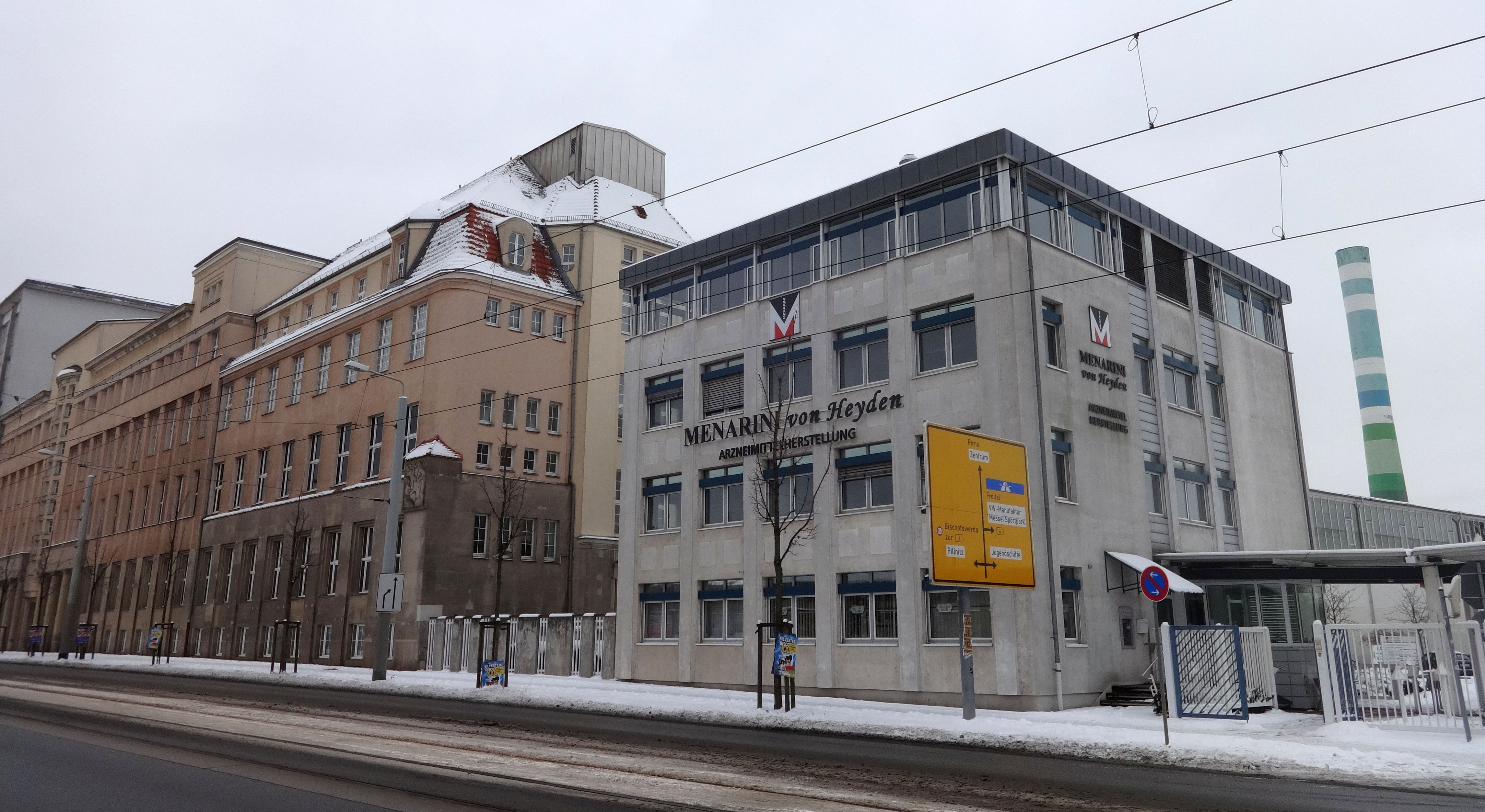 Das ehemalige Arzneimittelwerk Dresden an der Leipziger Straße 7 - 13 gehört heute zur Firma Menarini. Das Werk trägt den Beinamen von Heyden nach dem Chemiker Friedrich von Heyden.